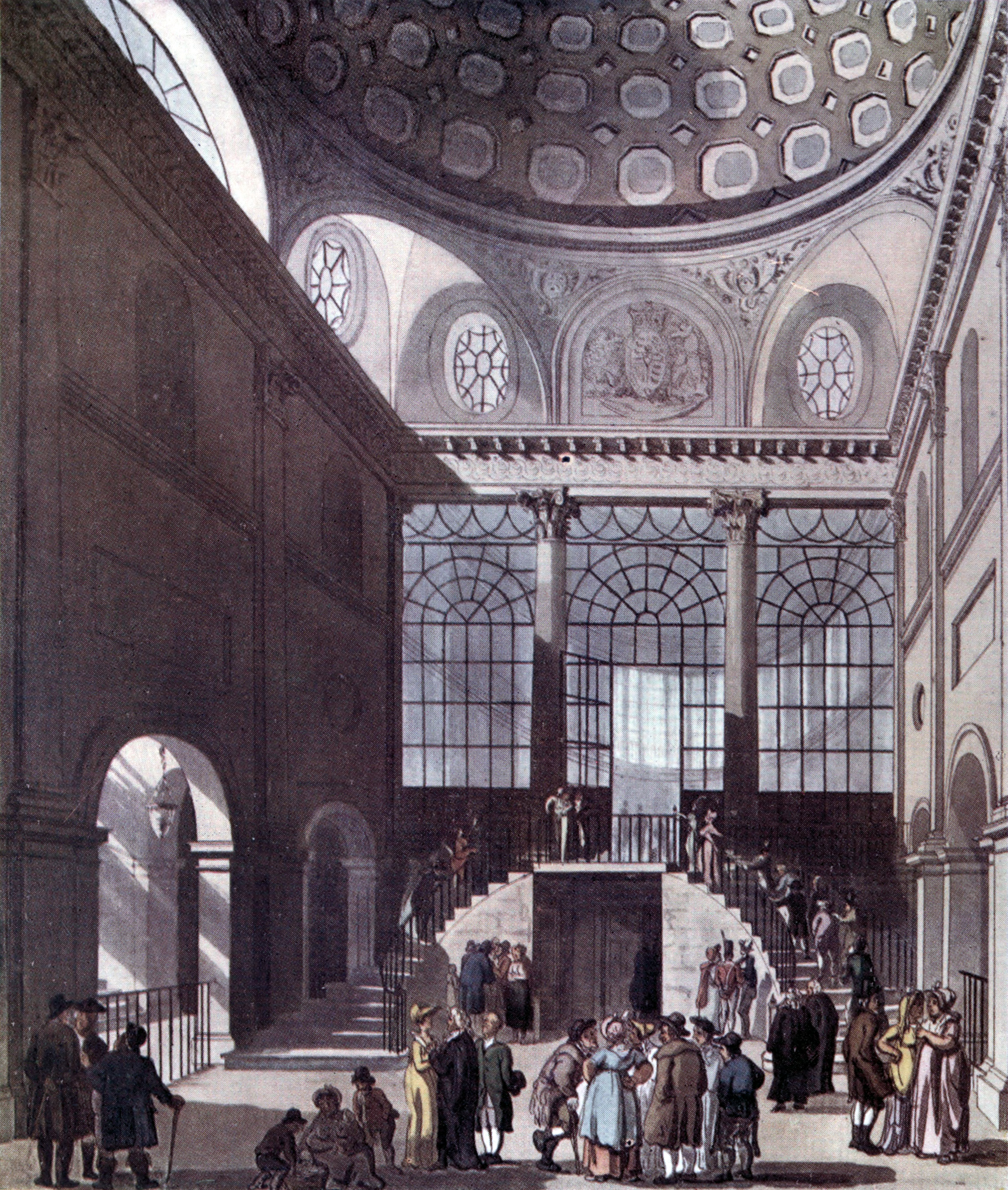 Session House, Clerkenwell